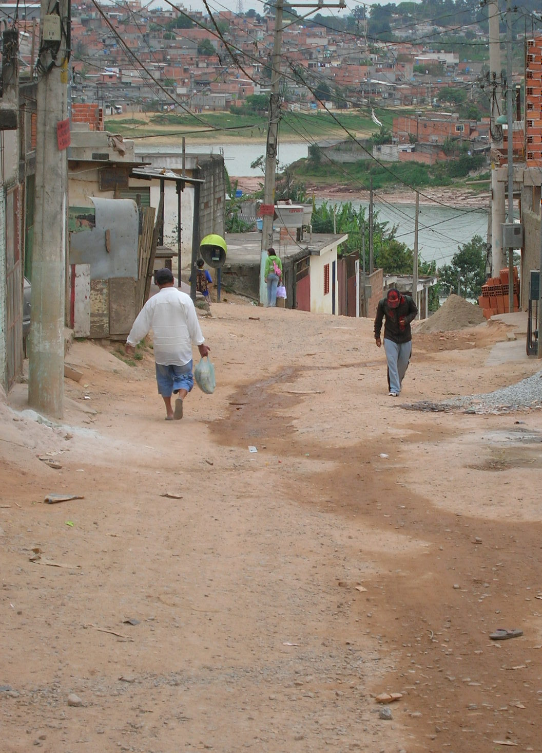 Cantinho do Ceu bairro de Sao Paulo do Brasil